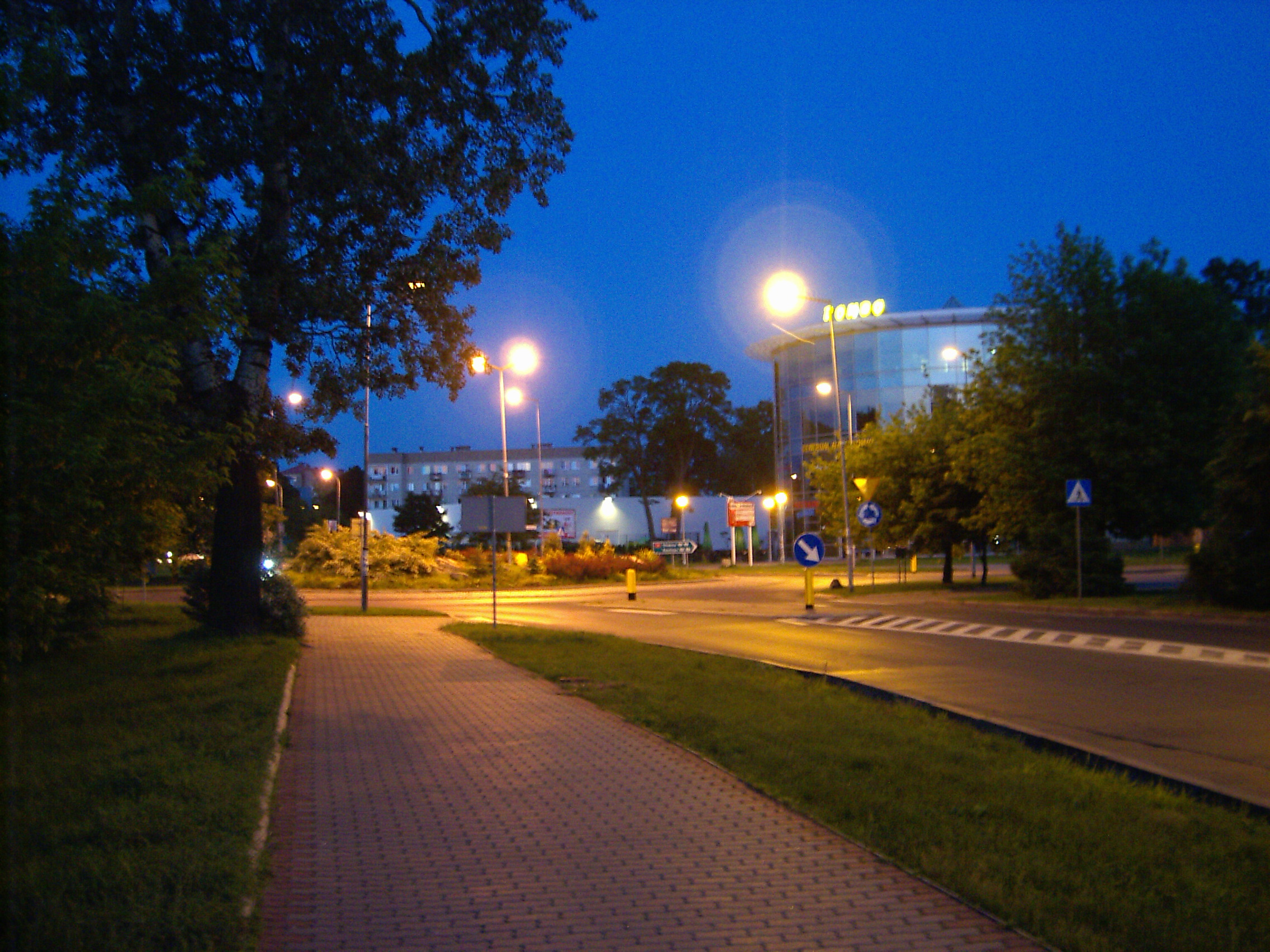 Rondo in Kostrzyn nad Odrą at night